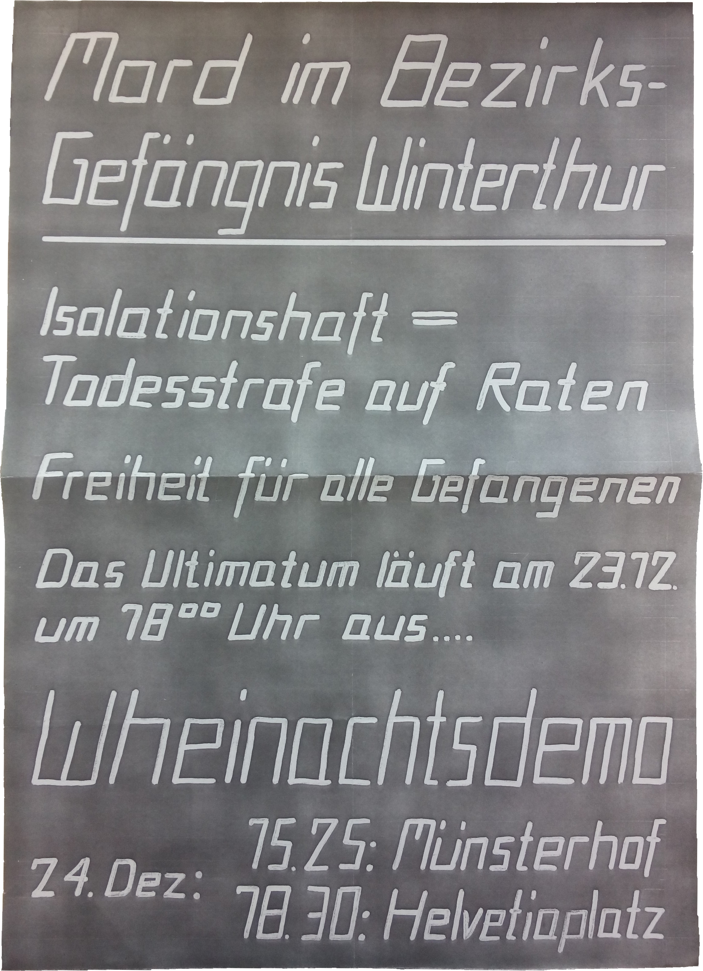 "Mord im Bezirks-Gefängnis Winterthur" - Demoaufruf in Zürich nach Selbstmord von Gabi S. im Rahmen der Winterthurer Ereignisse.